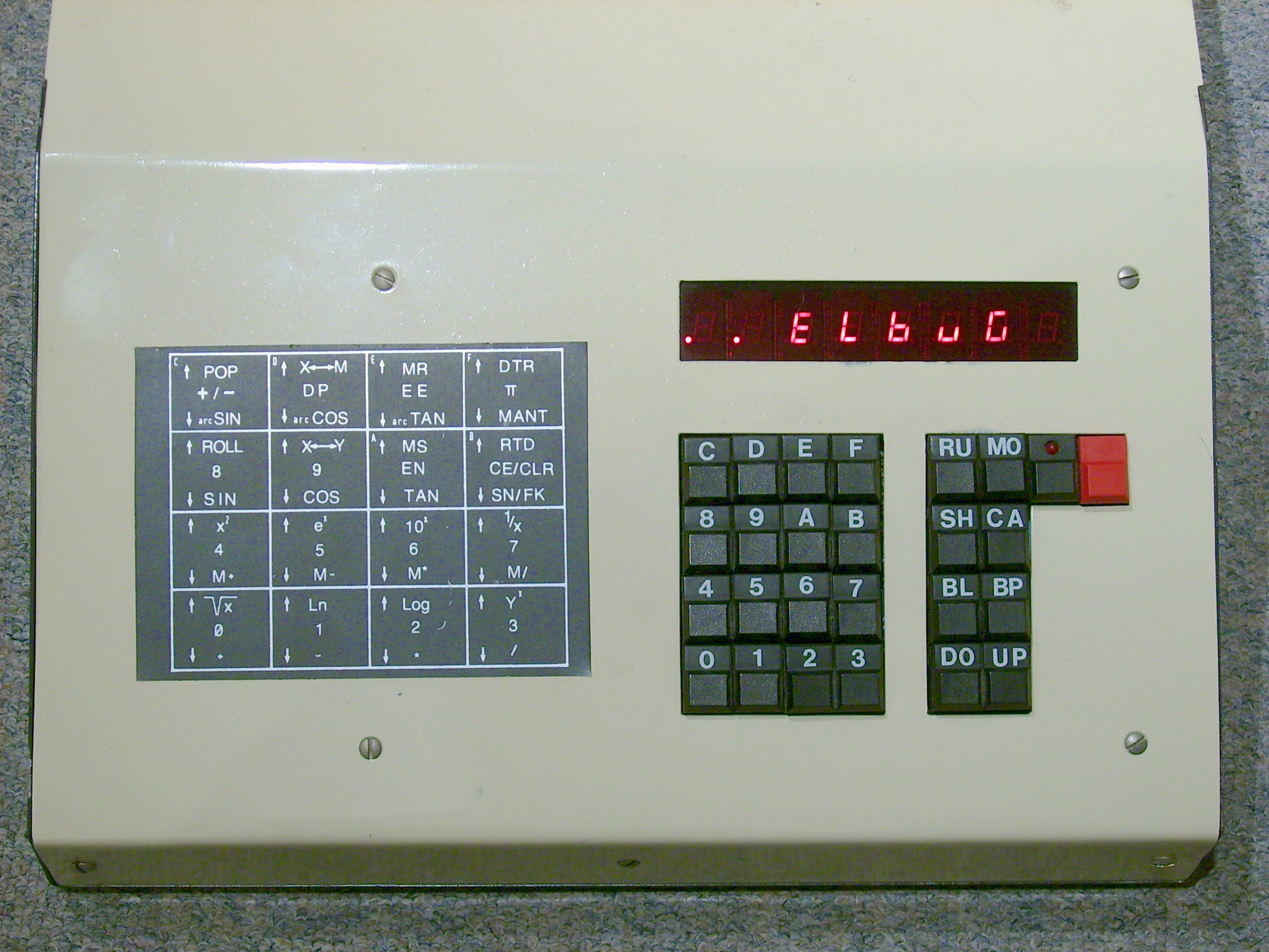 Selbstbau Mikrocomputer aus Elektor 1977